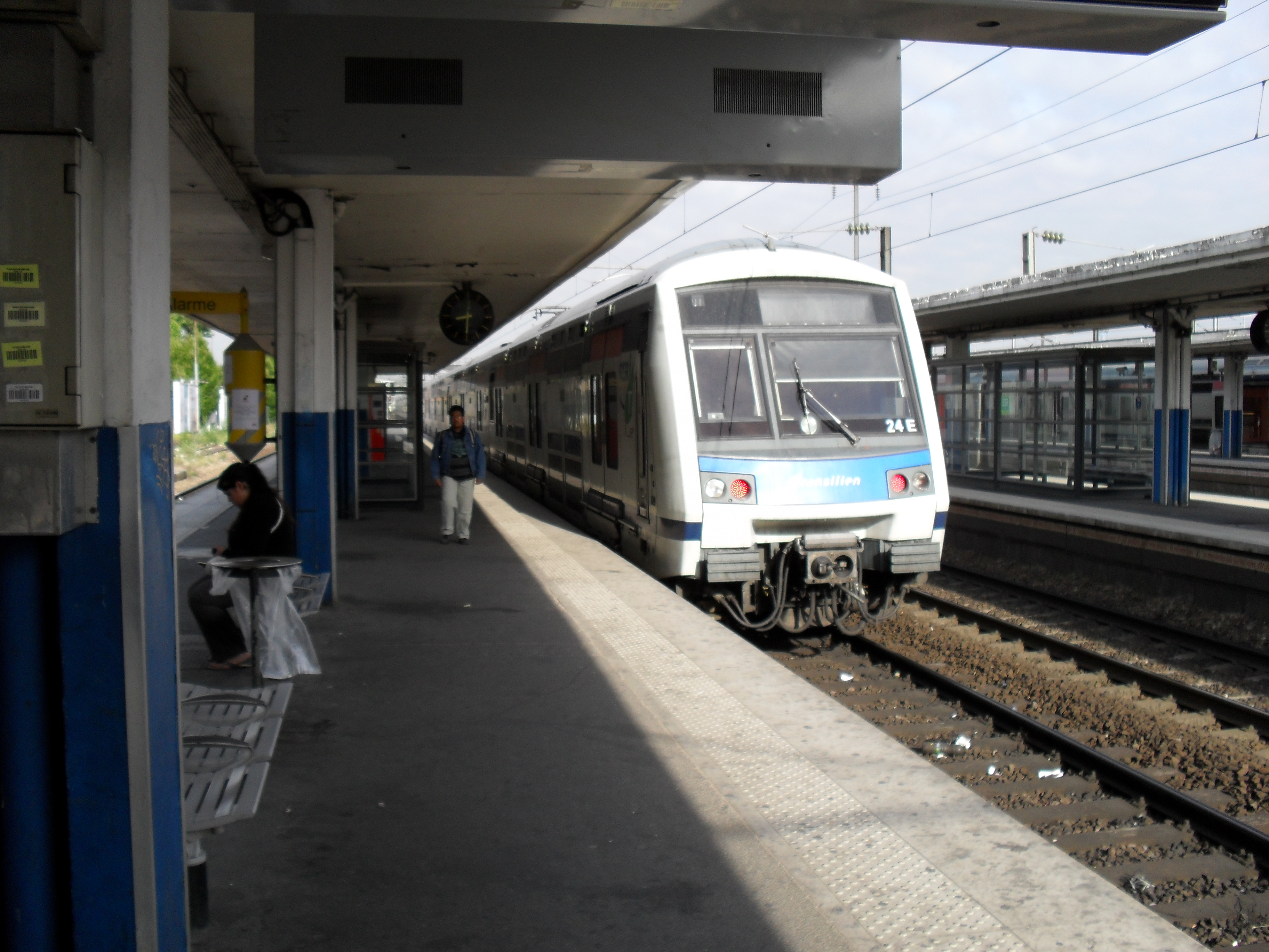 RER E - Gare de Noisy-le-Sec